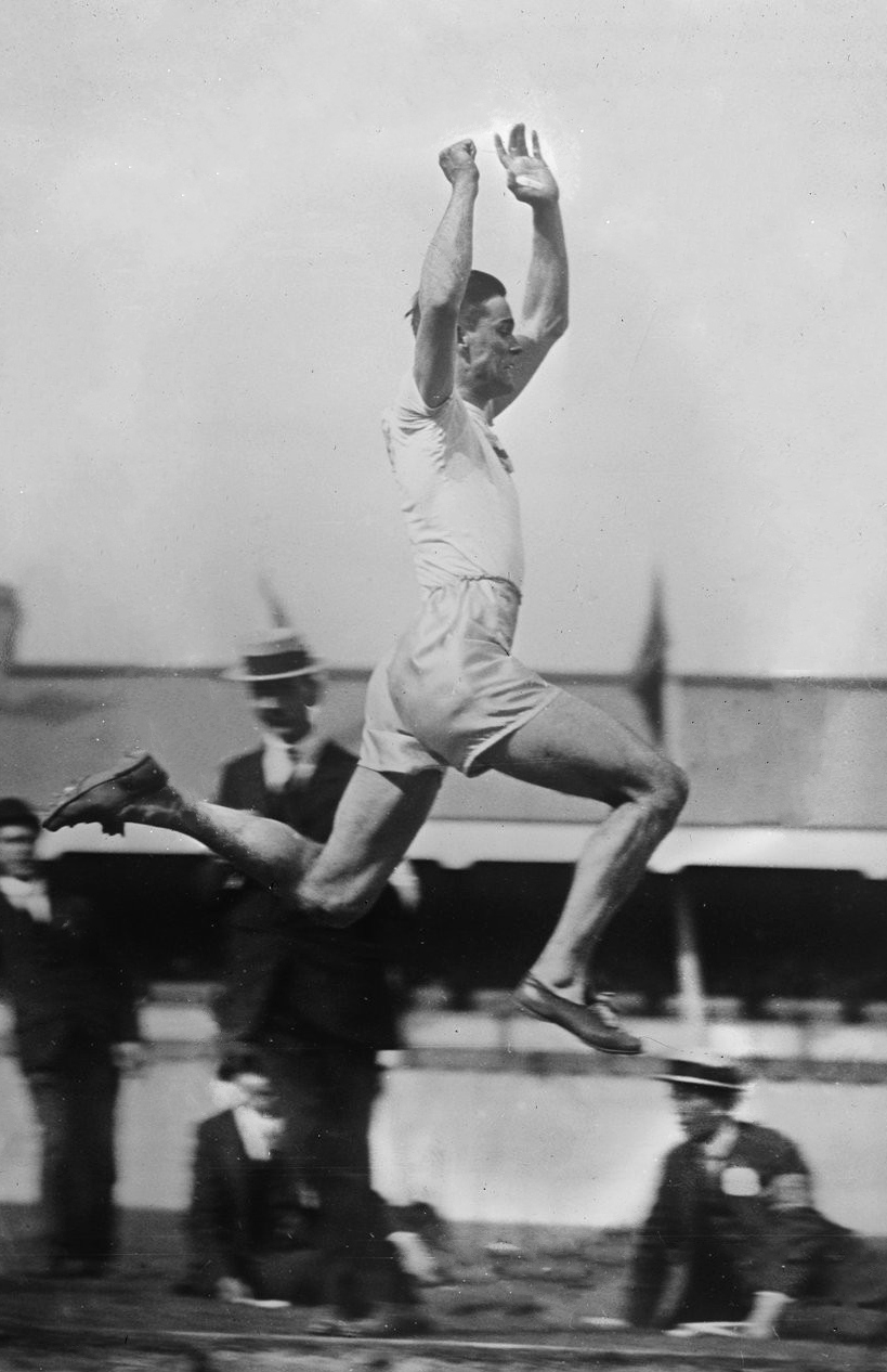 [Robert] Templeton, 4eme dans le saut en longueur [des Jeux olympiques d'Anvers, 18/8/20] : [photographie de presse] / [Agence Rol]